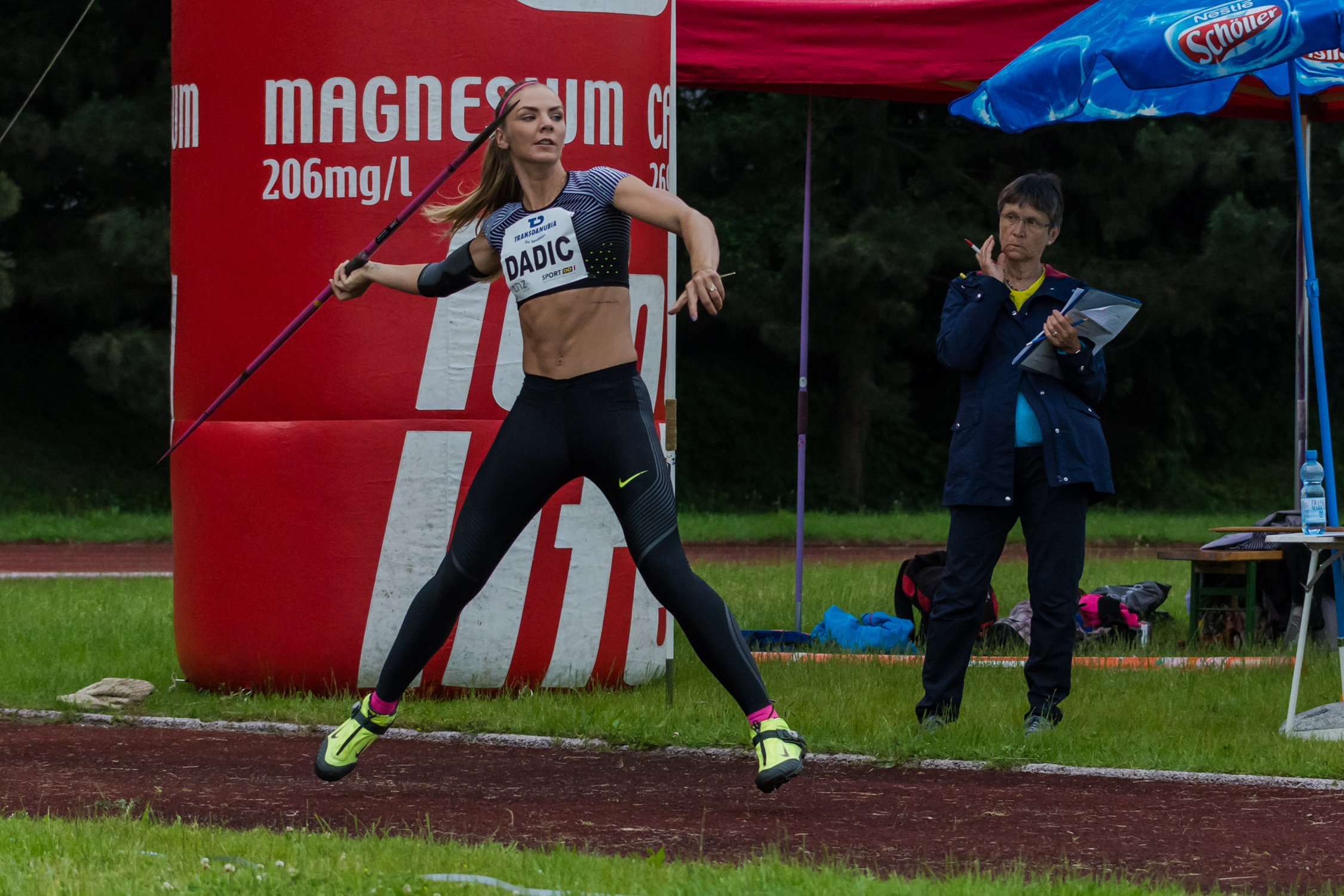 Top Meetings Austria 2016: Linzer Leichtathletik-Gala - Linz / Sportunion Landeszentrum, 11.06.2016 / Ivona Dadic